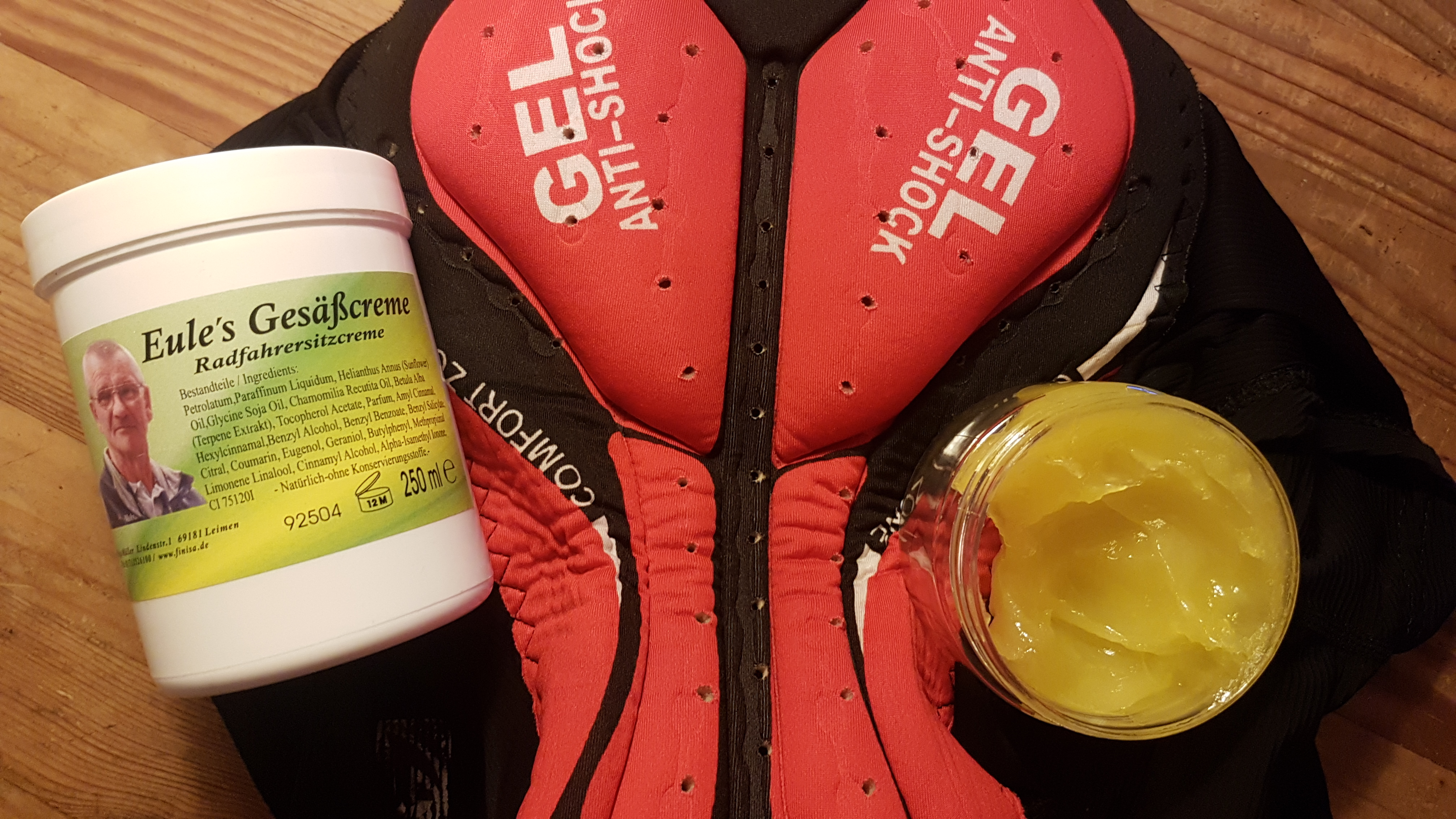 Sitzcreme für Radfahrende